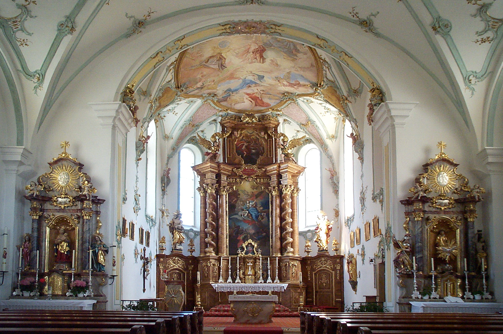 Geiselhöring, Hadersbach 28. Katholische Filialkirche Mariä Himmelfahrt. Beim Einritt in den lichtdurchfluteten Innenraum wird man von der großzügigen und einheitlichen Wirkung überrascht, die im wesentlichen durch die raumübergreifende Dekoration hervorgerufen wird. Spiegelgewölbe mit Stichen, das an der Wand ansitzt. Deckengemälde im Chor v. Matthäus Günther: Mariä Himmelfahrt; in den Zwickeln Grisaillen.